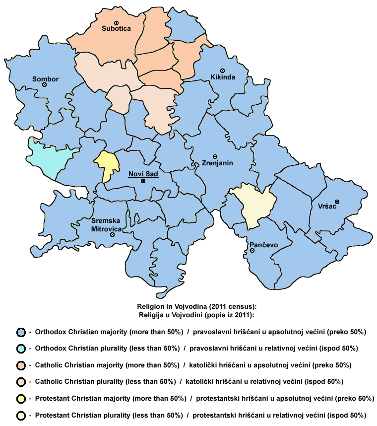 Map of religion in Vojvodina (2011 census), data by cities and municipalities. Mapa religije u Vojvodini (popis 2011), podaci po gradovima i opštinama.